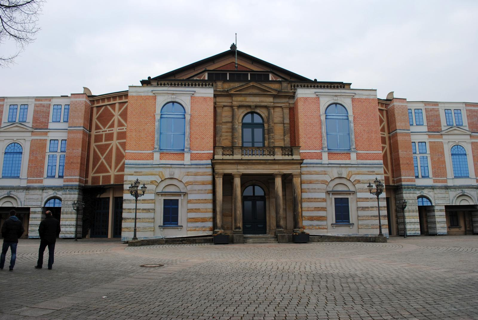 Festspielhaus in Bayreuth im März 2014, Gerüst hinter bemalten Planen versteckt